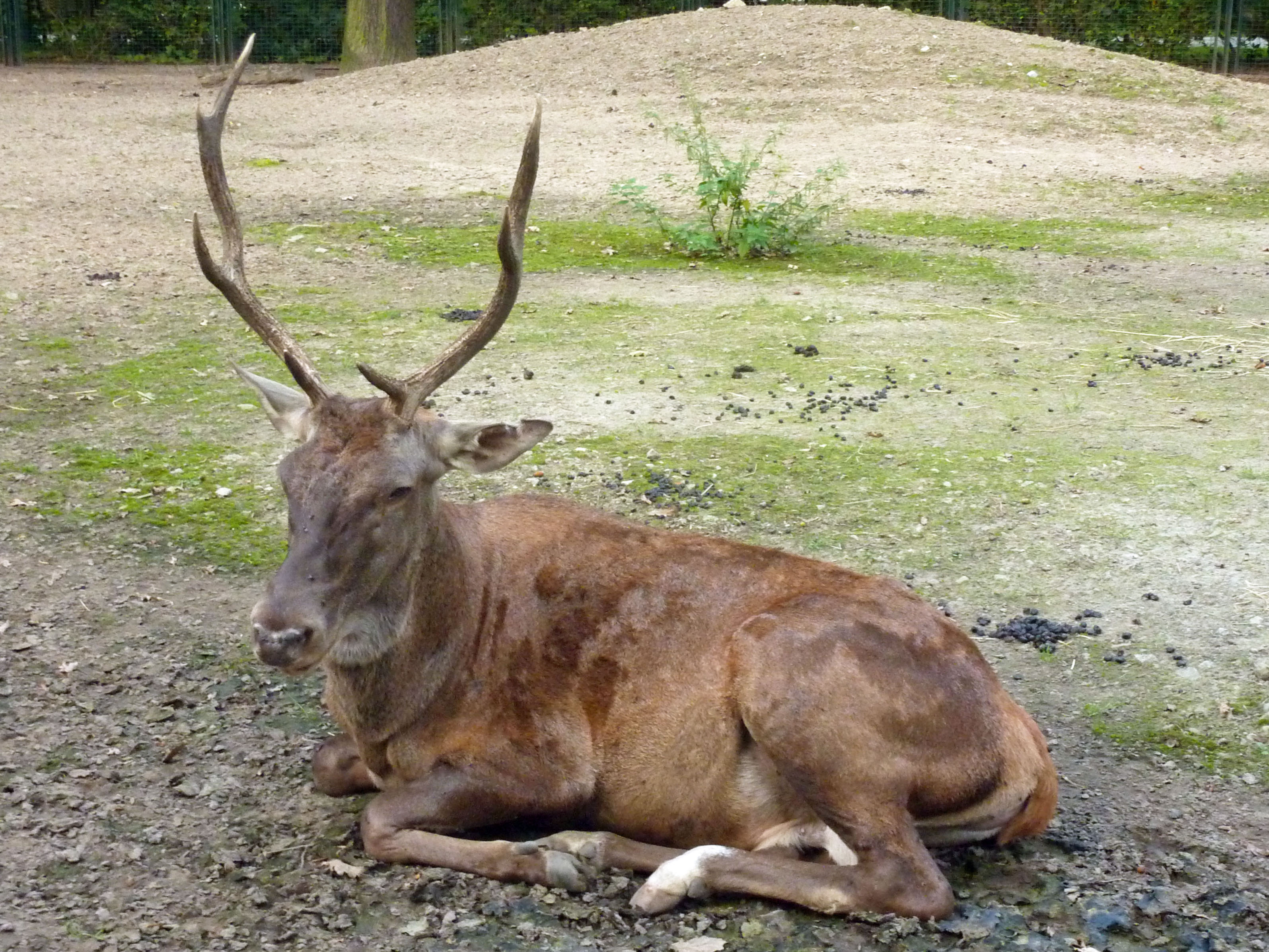 Männlicher Atlashirsch (Berberhirsch, Cervus elaphus barbarus) im Tierpark Berlin (Friedrichsfelde), im ehemaligen Gehege der Mitteleuropäischen Rothirsche nahe dem Terrassencafé. Das Männchen kam im Jahr 2010 zusammen mit drei Weibchen aus der Nachzucht des San Diego Wild Animal Park, der bis dahin außerhalb Nordafrikas einzigen Haltung dieser gefährdeten Unterart des Rothirsches. Es wurde laut Tierpark-News im Jahr 2002 gebohren und erhielt in Berlin den Namen Sidi.